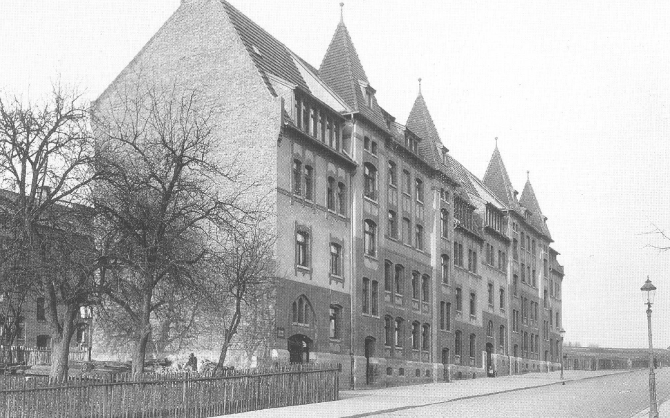 Häuser des Spar-und Bauvereins in der Heinrich-Heine-Straße, Kassel, vor der Zerstörung, Foto 1900